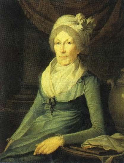 Kolokoltsova (Anichkova) Maria